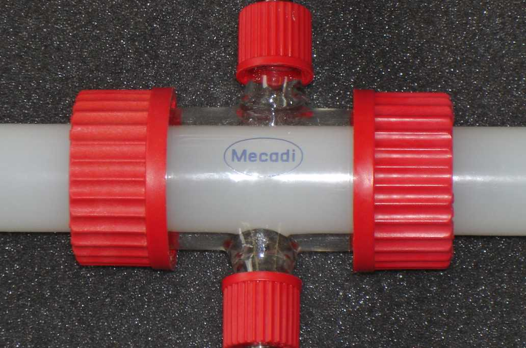 Permeationsmesszelle für Rohre